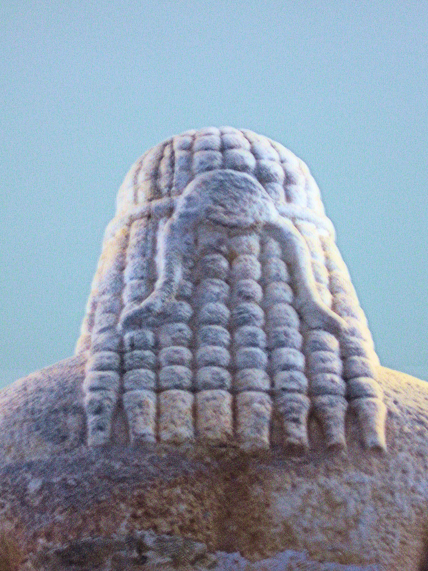 Vollendete Haarpracht des Kouros, Museum Limenas / Thasos